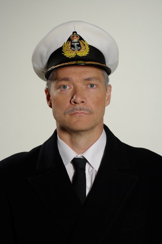 Riho Kütsar lavastuses 'Minu järel, seltsimees'.